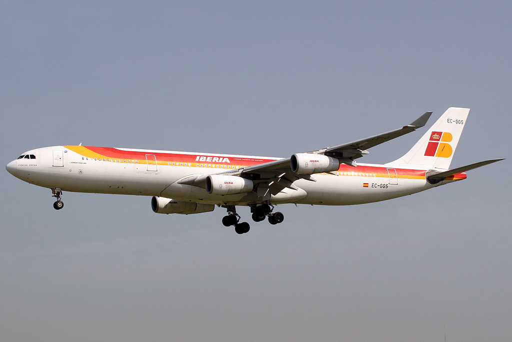 Airbus A340-313 Iberia EC-GGS